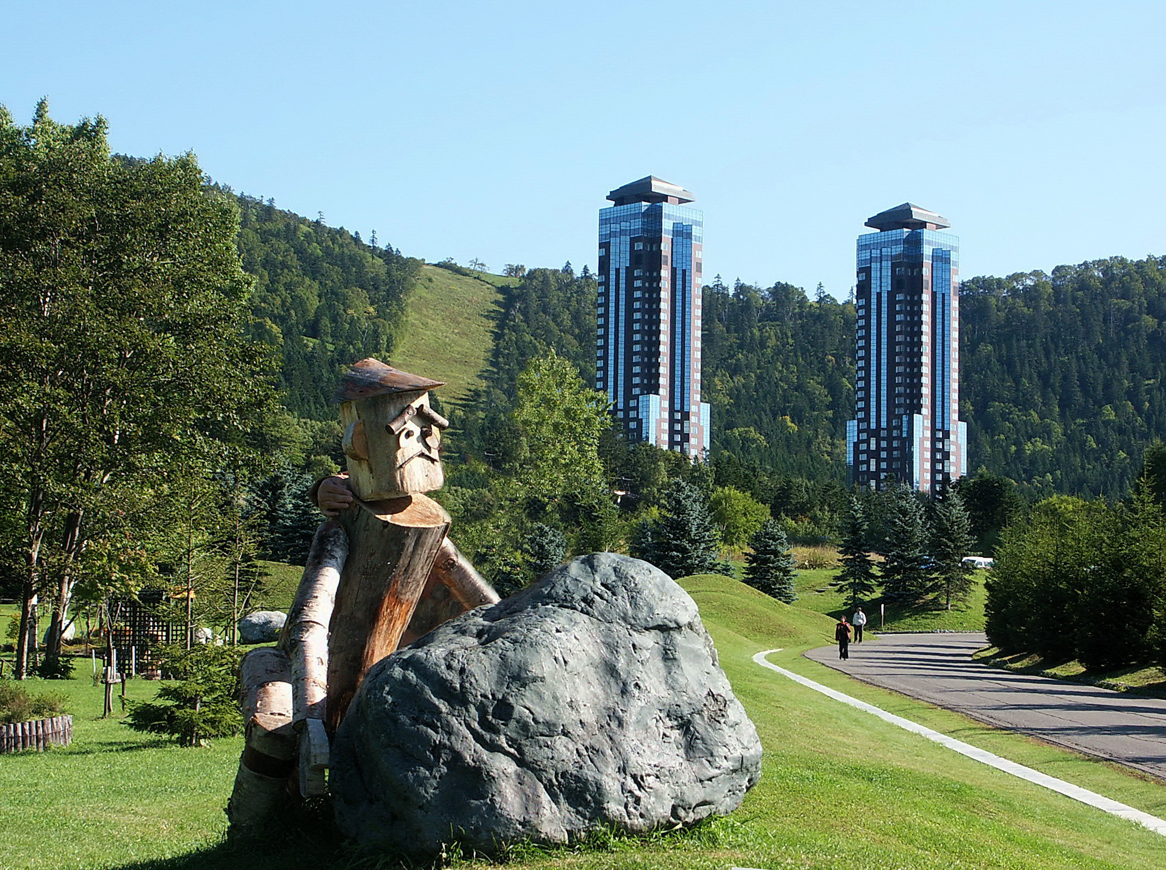 星野渡假村 Hoshino Tomamu Resort